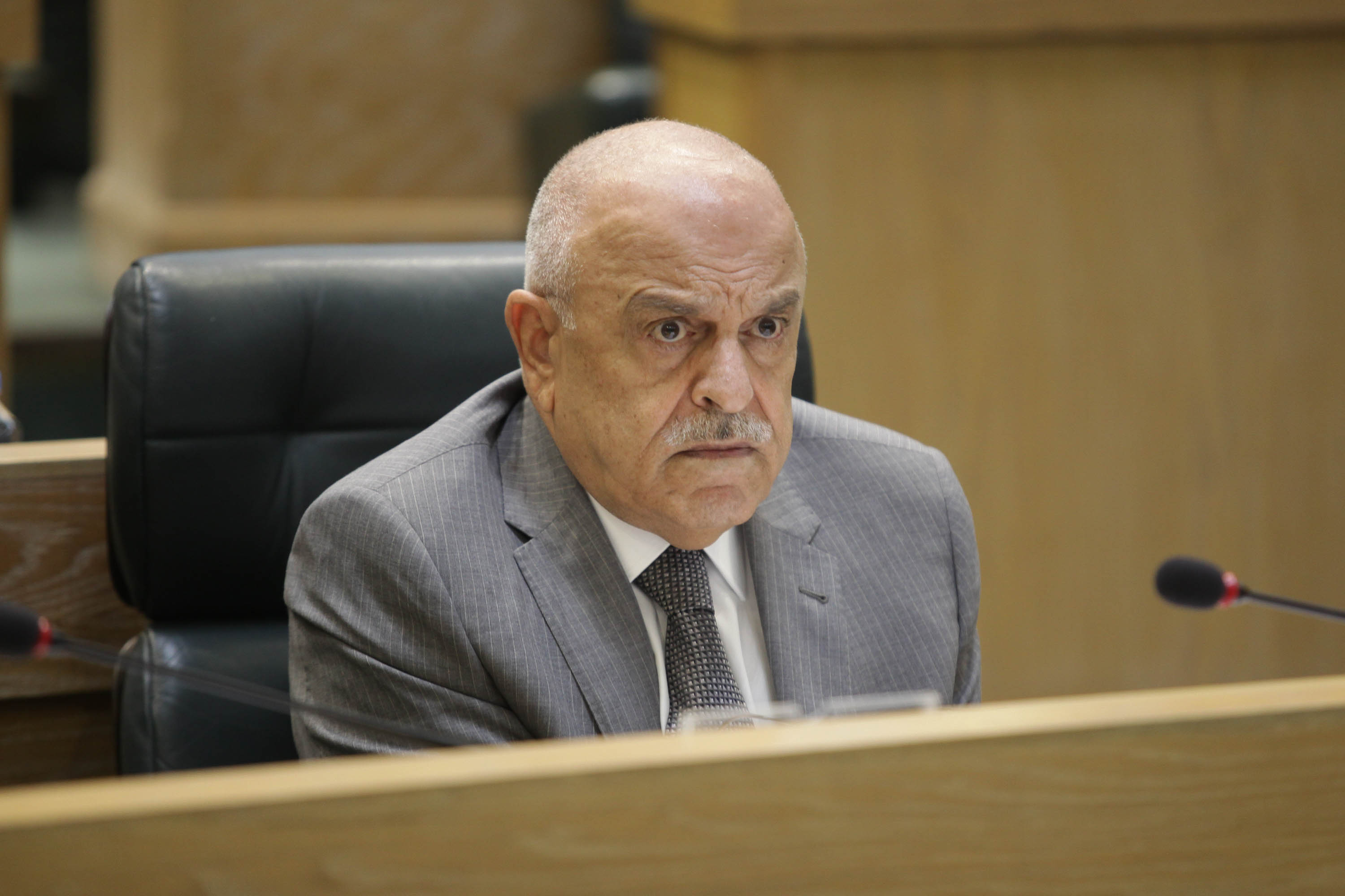 جلسة مجلس النواب الأردني ليوم 16 سبتمبر 2018 تصوير أحمد عبده الشركة الأردنية للصحافة والنشر الدستور ا